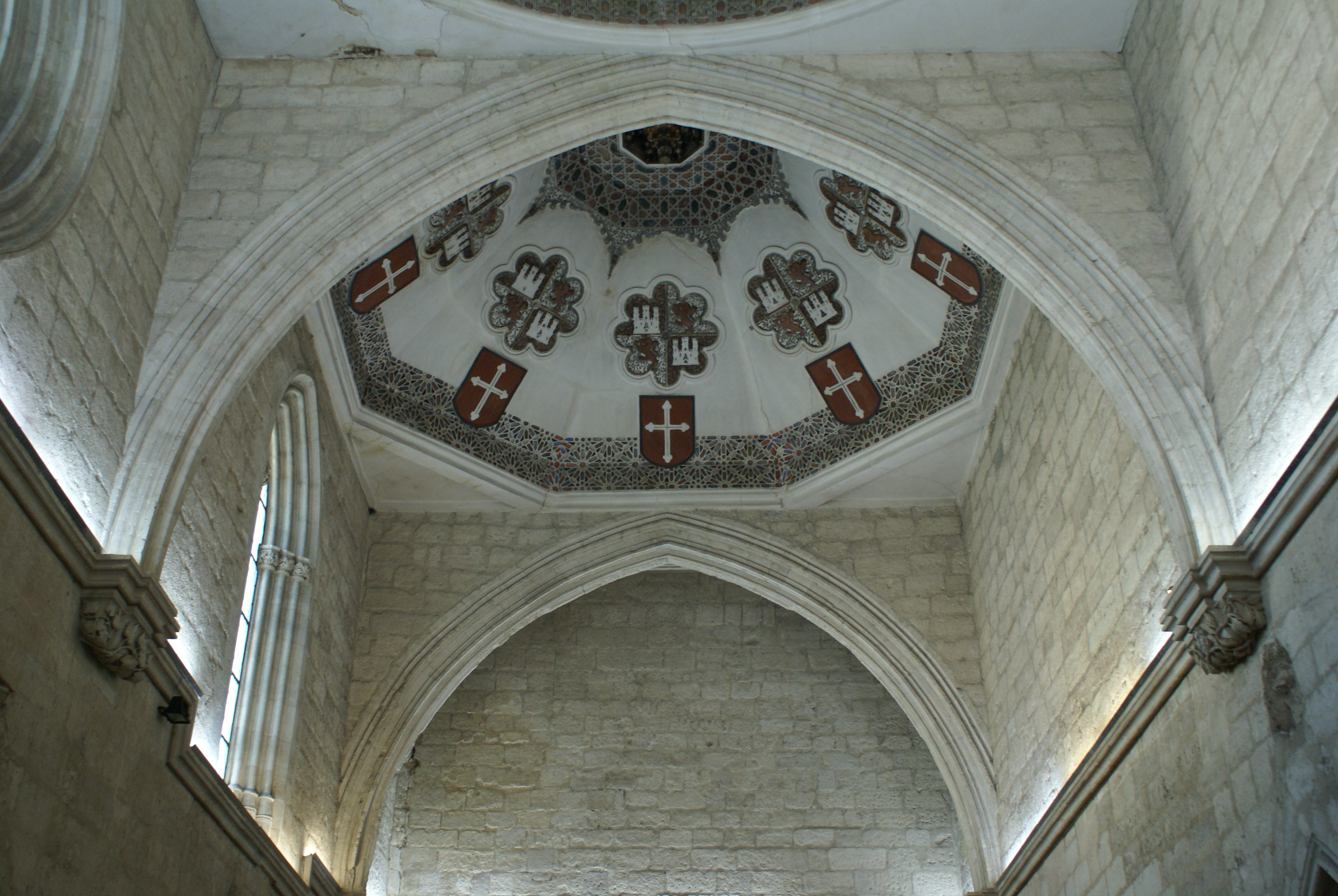 Cúpula octogonal de la capilla de San Lorenzo, en la antigua Colegiata de Valladolid, parte de la Catedral de Valladolid actual.